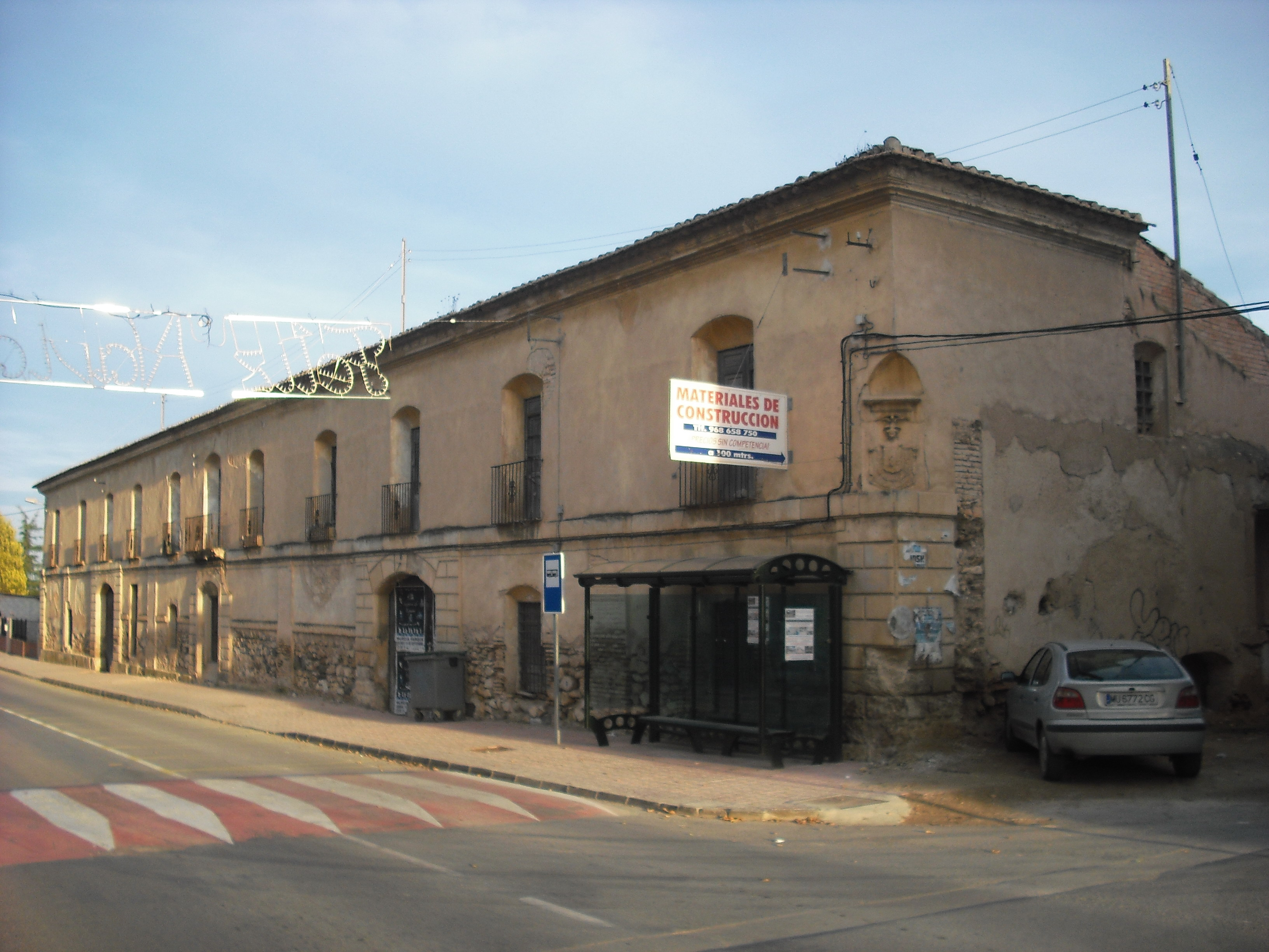 posadas